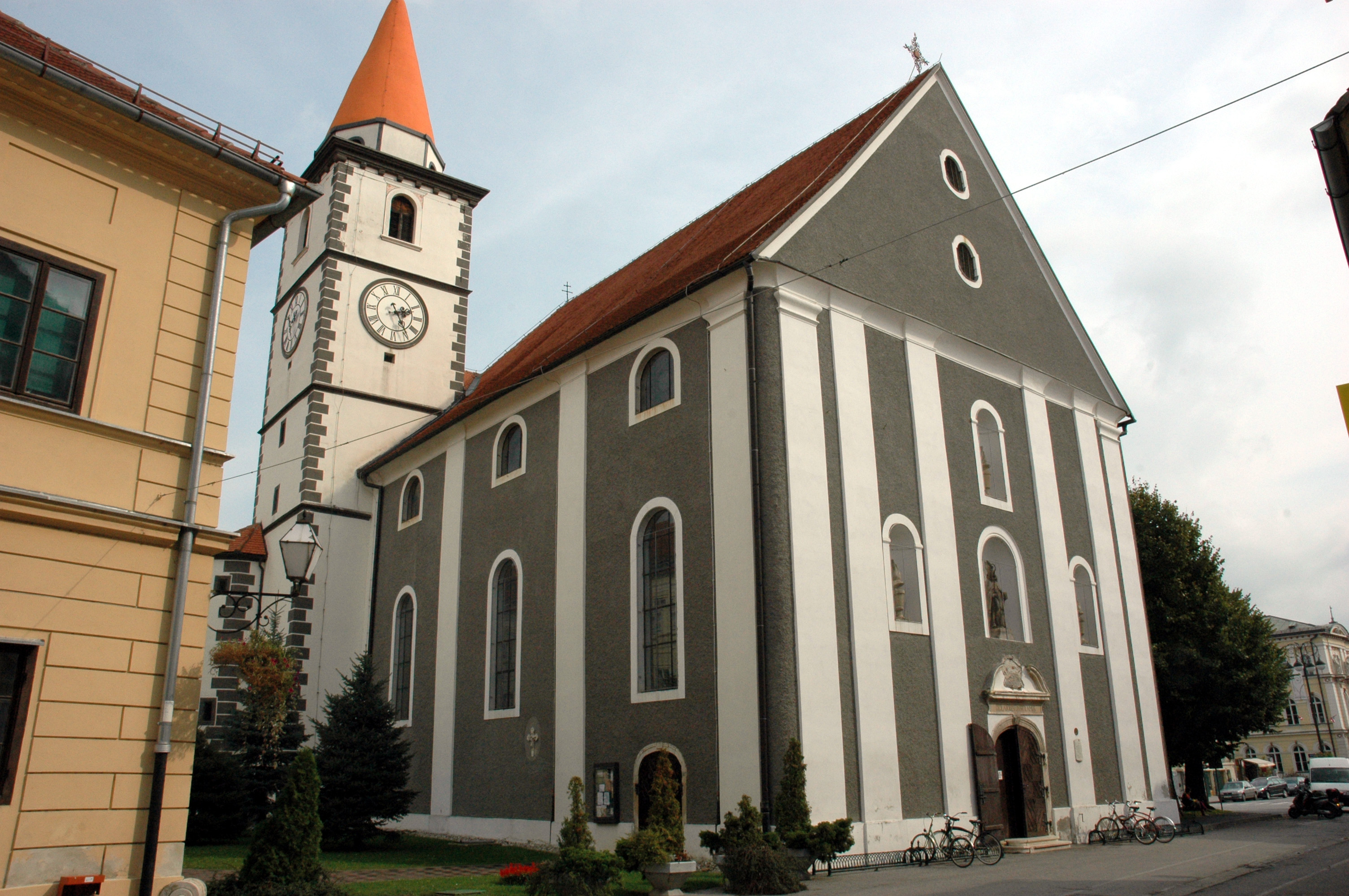 Župna crkva sv. Nikole u Varaždinu.